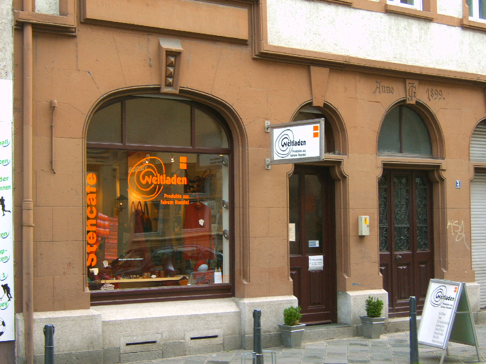 Weltladen Mannheim (S2, 3)